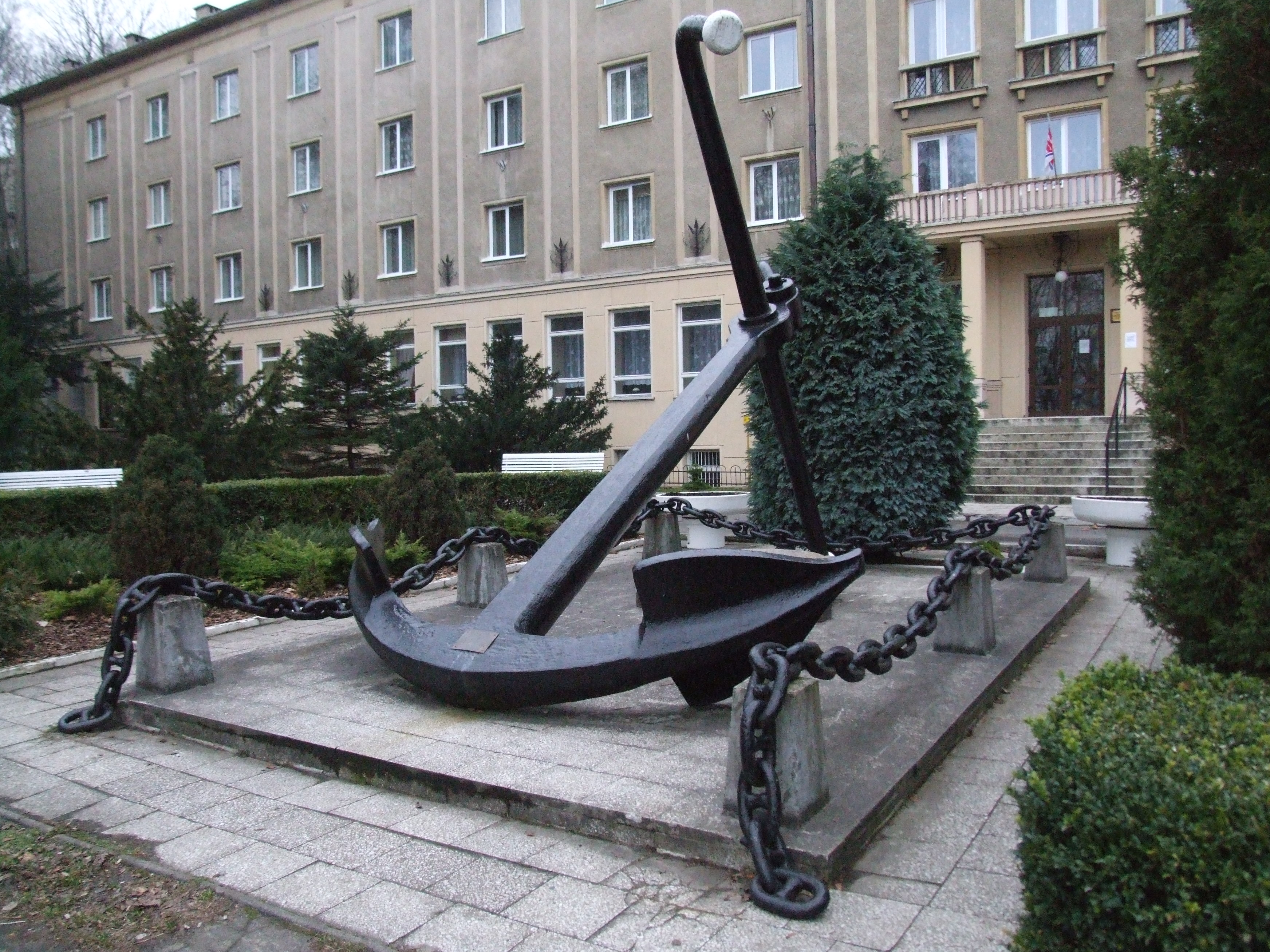 Kotwica - Pomnik Marynarzom Polskiej Marynarki Handlowej w Gdyni